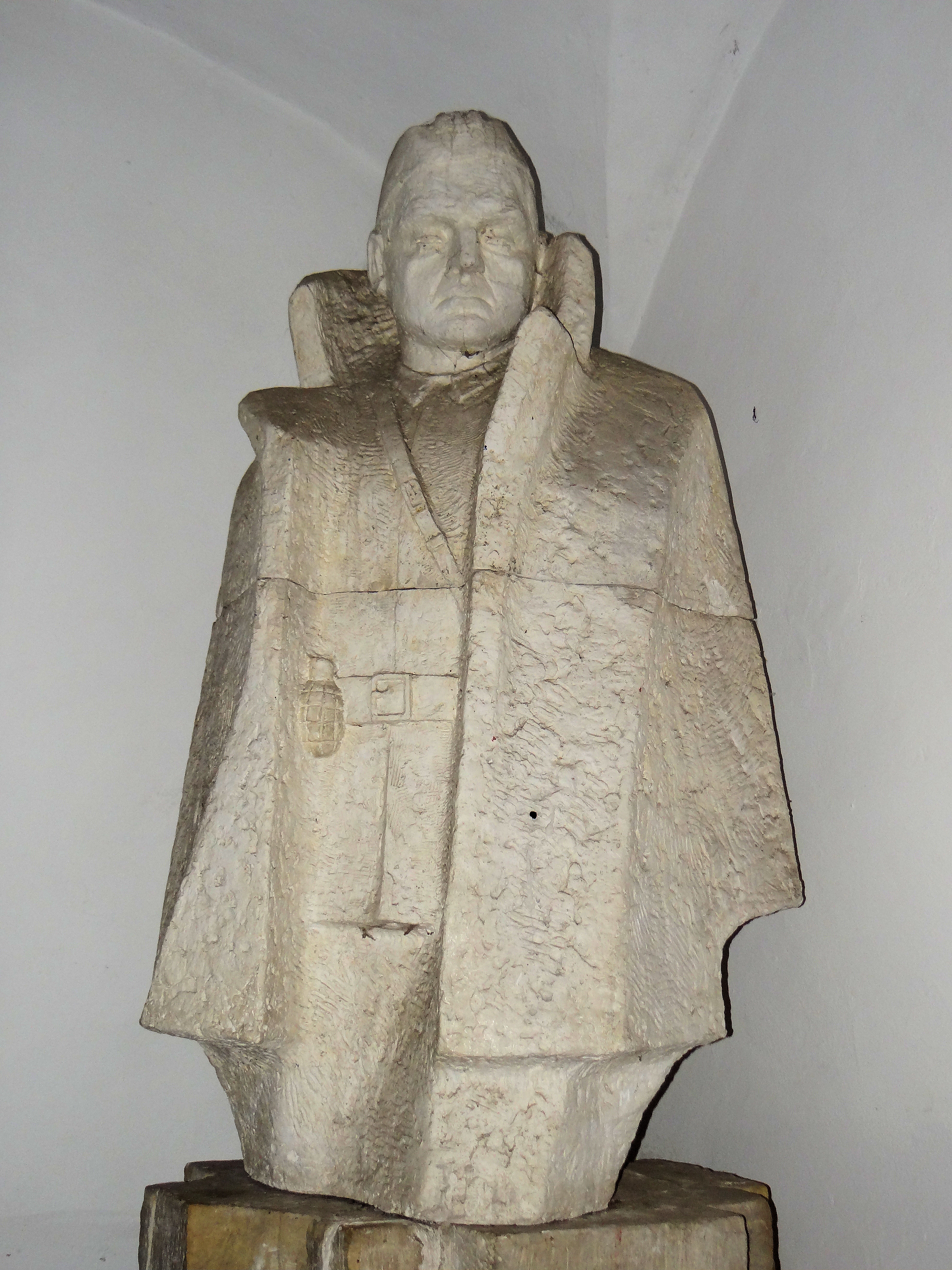 Klasztor Cystersów w Wąchocku - postać mjr Jana Piwnika "Ponurego" - prototyp pomnika